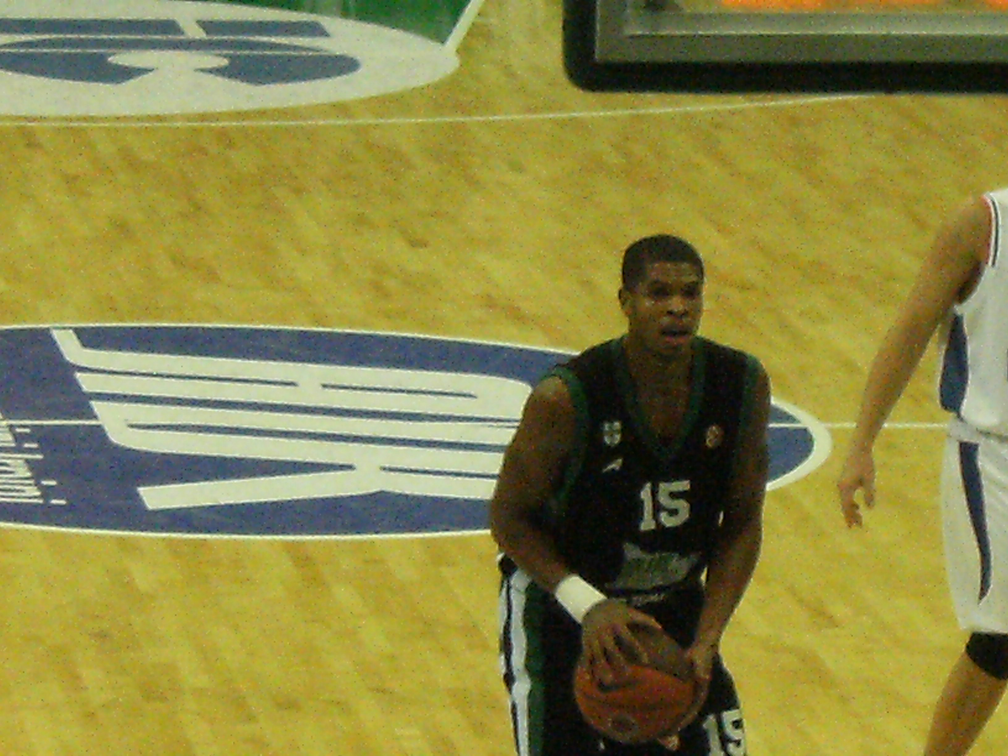 Tamar Slay (Air AV-KK Cibona Zagabria)